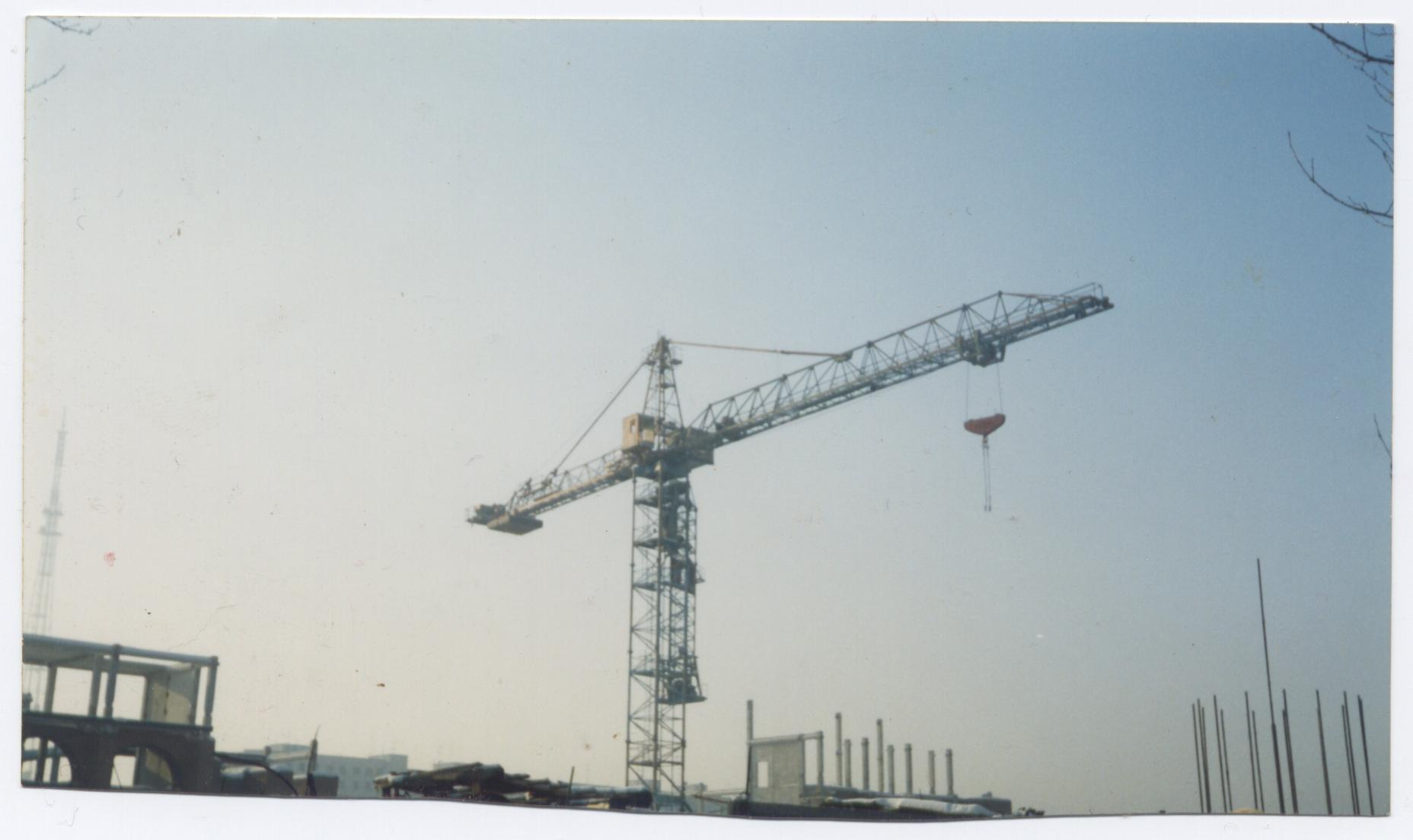 Разбитый и разграбленный кран КБ-674 (1981 г.в.). Строительство Дворца Культуры «Сибсельмаш», Пл. Маркса, Новосибирск, 1993 год.